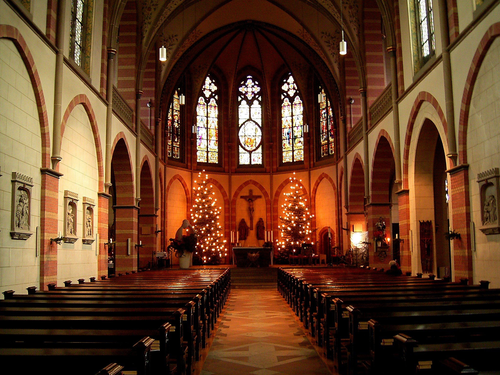 Lüdenscheid